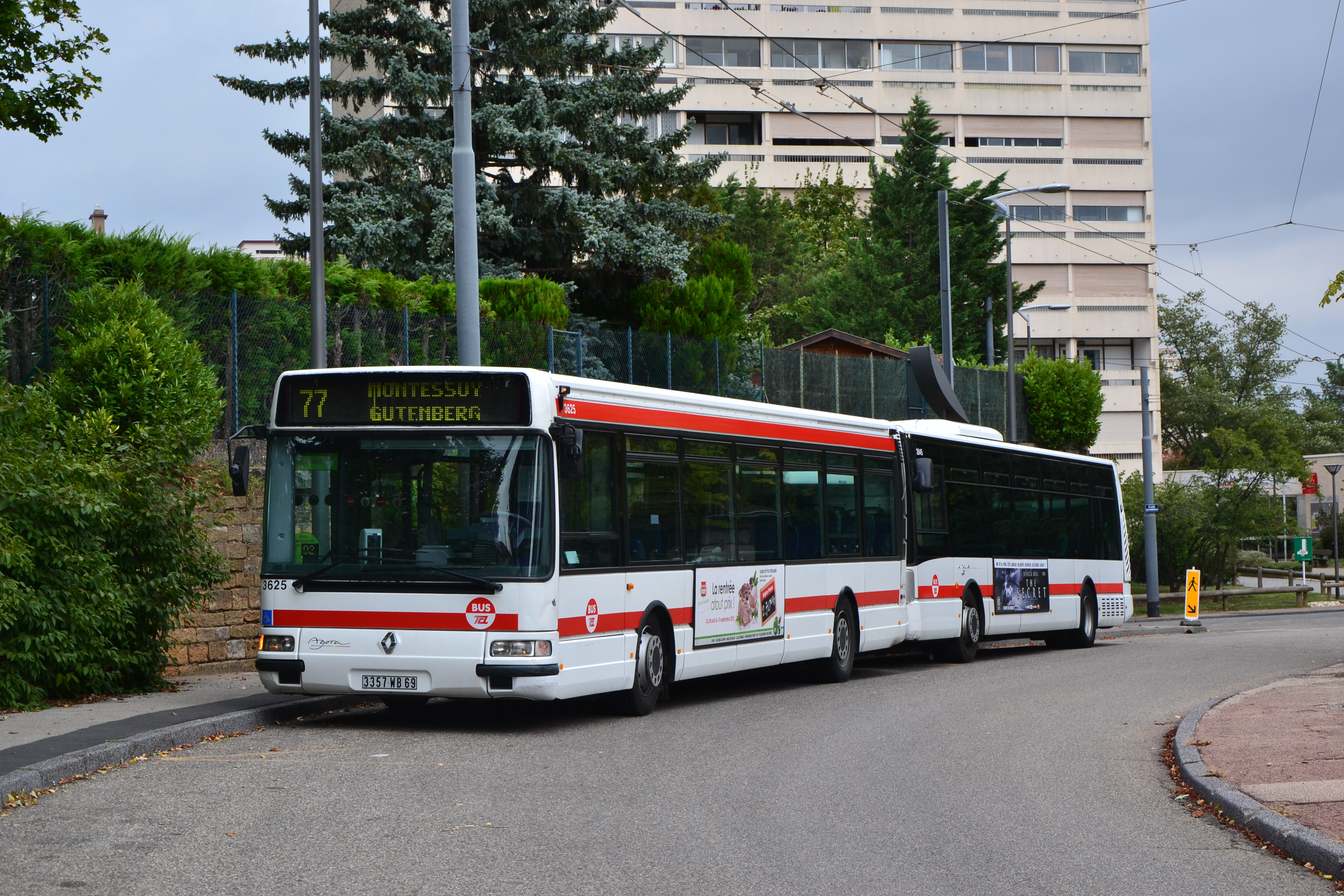 Renault Agora S n°3625 sur la ligne 77, à son terminus Montessuy Gutenberg sur la commune de Caluire-et-Cuire près de Lyon.